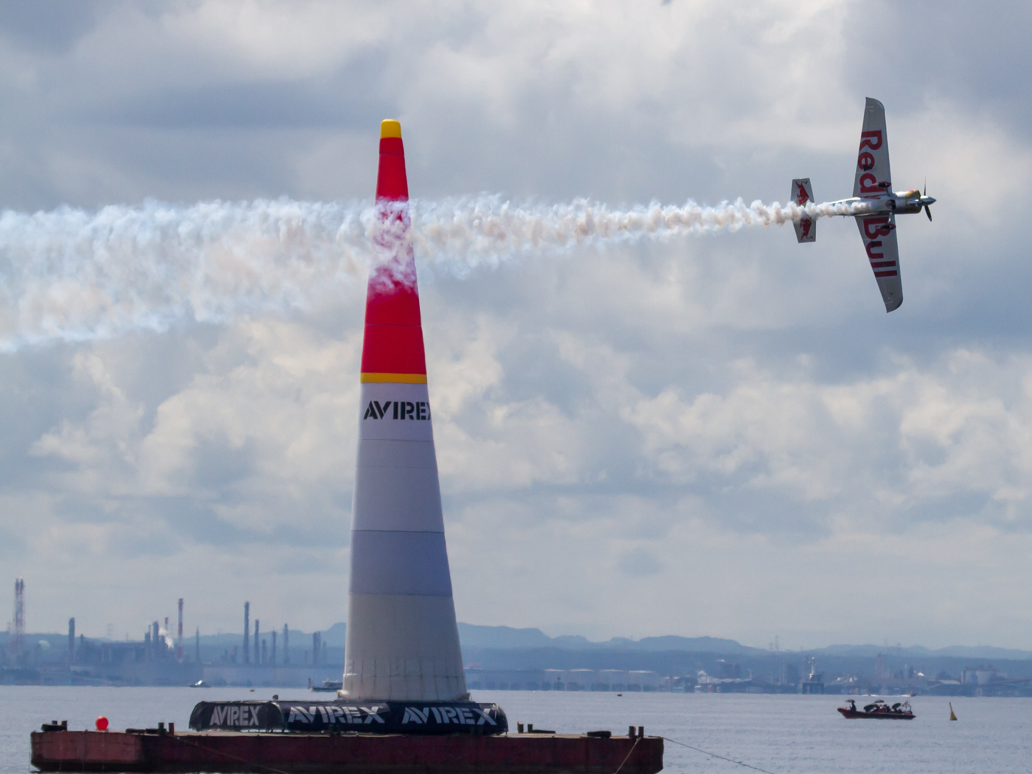 2019年レッドブル・エアレース・ワールドシリーズ 千葉 1日目 テストフライト